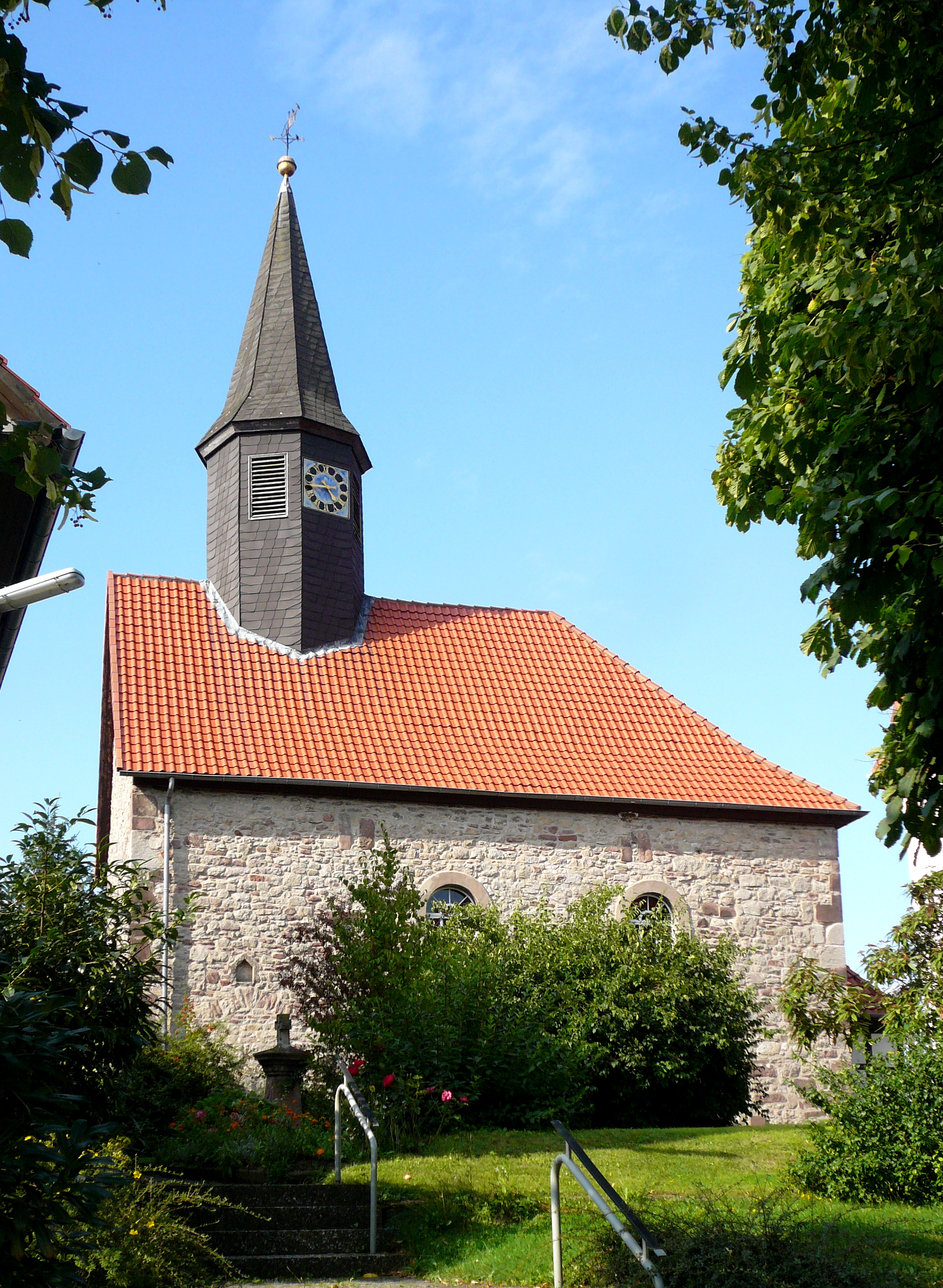 Ev.-luth. Kirche St. Nicolai in Dramfeld, Gemeinde Rosdorf, Niedersachsen. Ursprungsbau wahrscheinlich 1259, um 1300 als zweigeschossige Kapelle ausgebaut, 1776 Umgestaltung (Fenster, Portal). Ehemaliger Turm 1868 abgetragen und durch Dachreiter ersetzt.